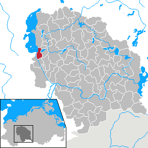 Raben Steinfeld in Mecklenburg-Vorpommern - District Parchim